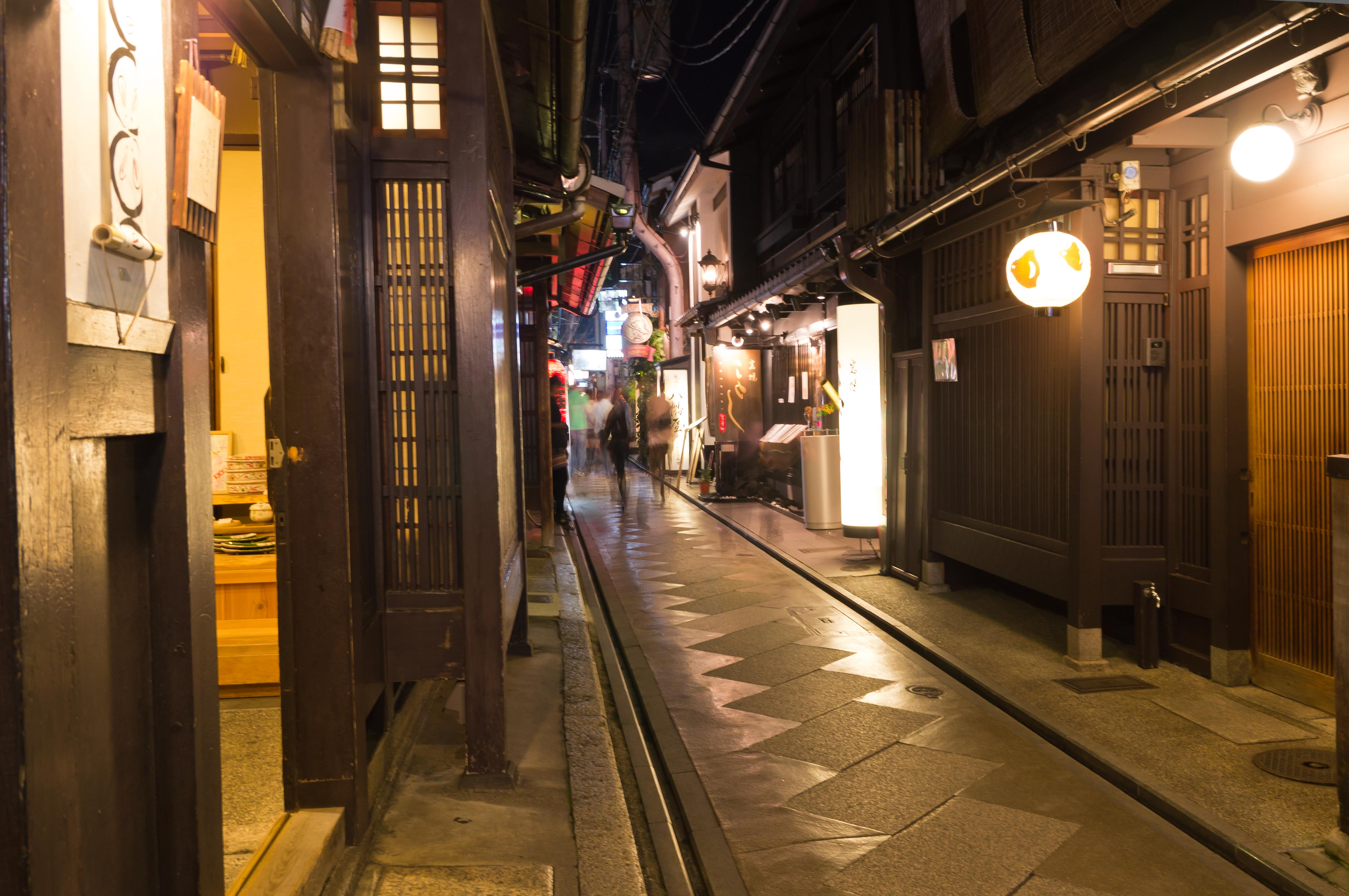 Eine Gasse in Gion